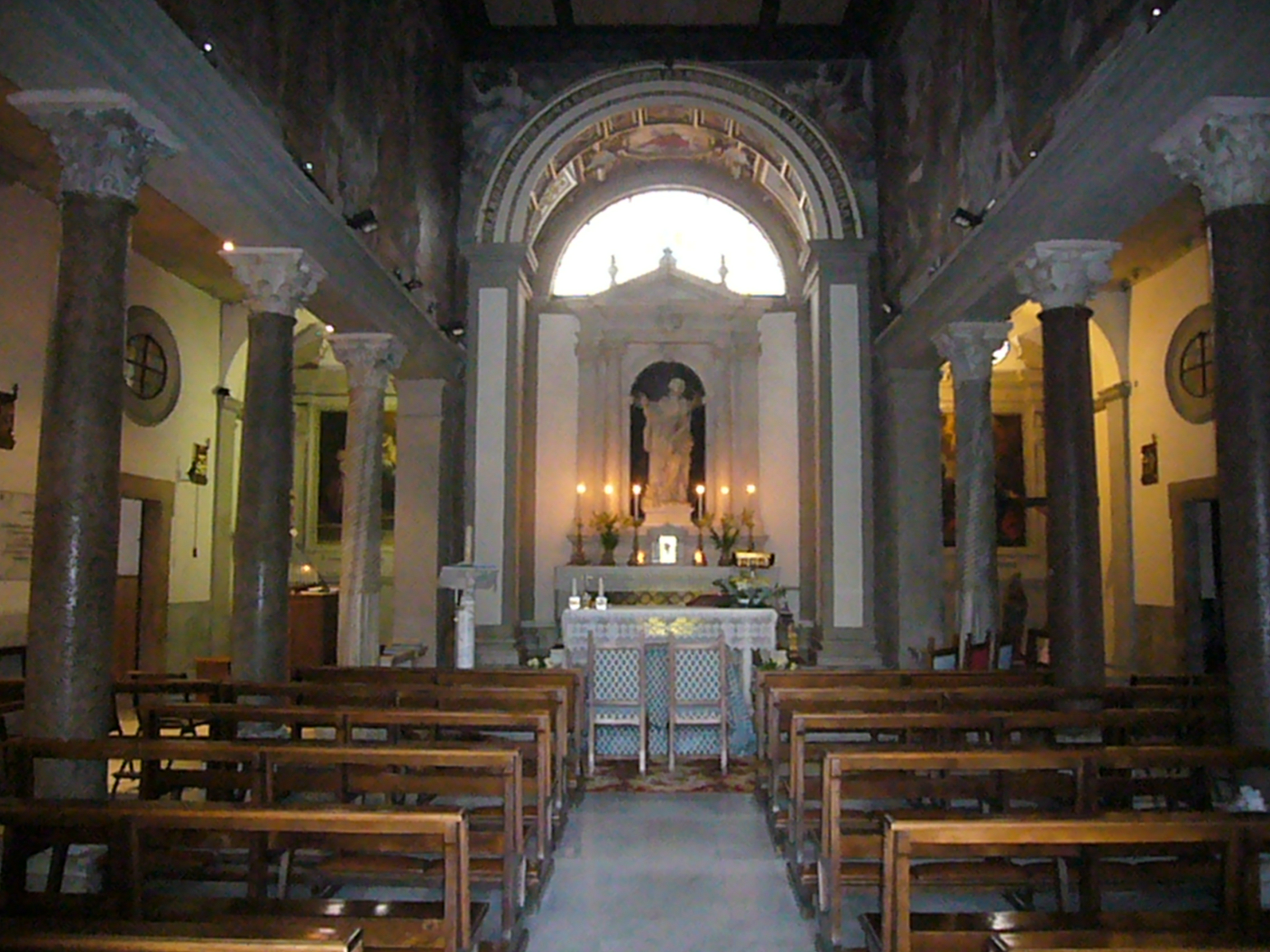 Roma, santa Bibiana, interno